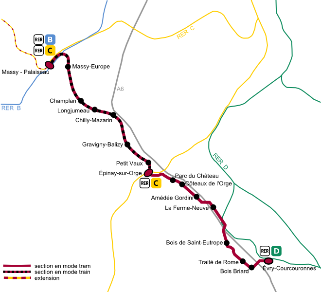 Tracé de la ligne 12 Express du tramway d'Île-de-France (avril 2020)